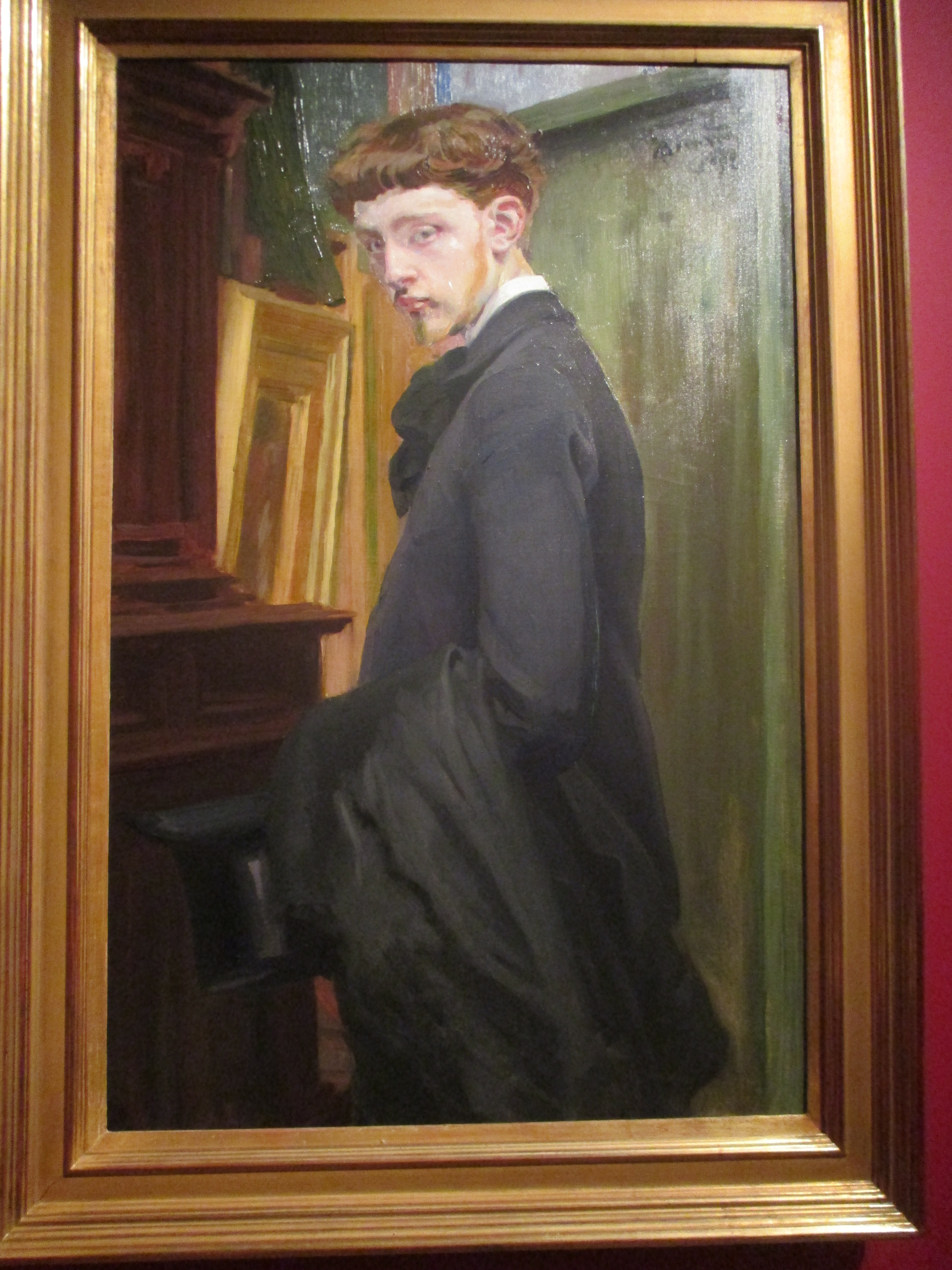 Albert Besnard (1849-1934): Portrait de Francis Jourdain (1876-1958), fils de Frantz Jourdain (1847-1933) architecte de La Samaritaine. Francis Jourdain assista Besnard dans ses décors. Peintre, il devint aussi céramiste et architecte d'intérieur. Huile sur toile (1892) présentée à l'exposition Besnard du Petit Palais de Paris d'octobre 2016 à janvier 2017. Collection particulière.